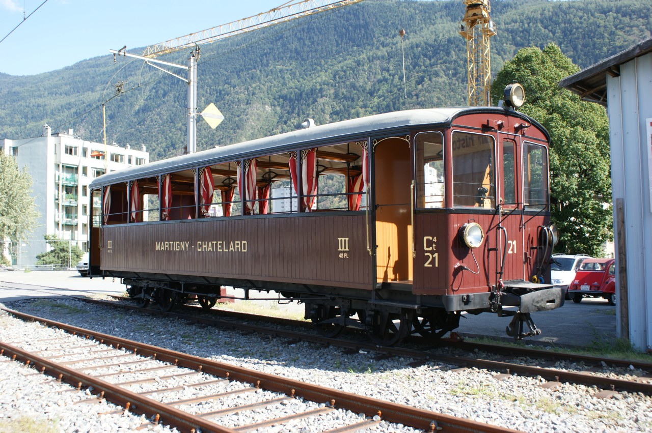 historisches Fahrzeug Ct4 21 Martigny–Châtelard (ex Bt 51, SWS 1905) in Martigny